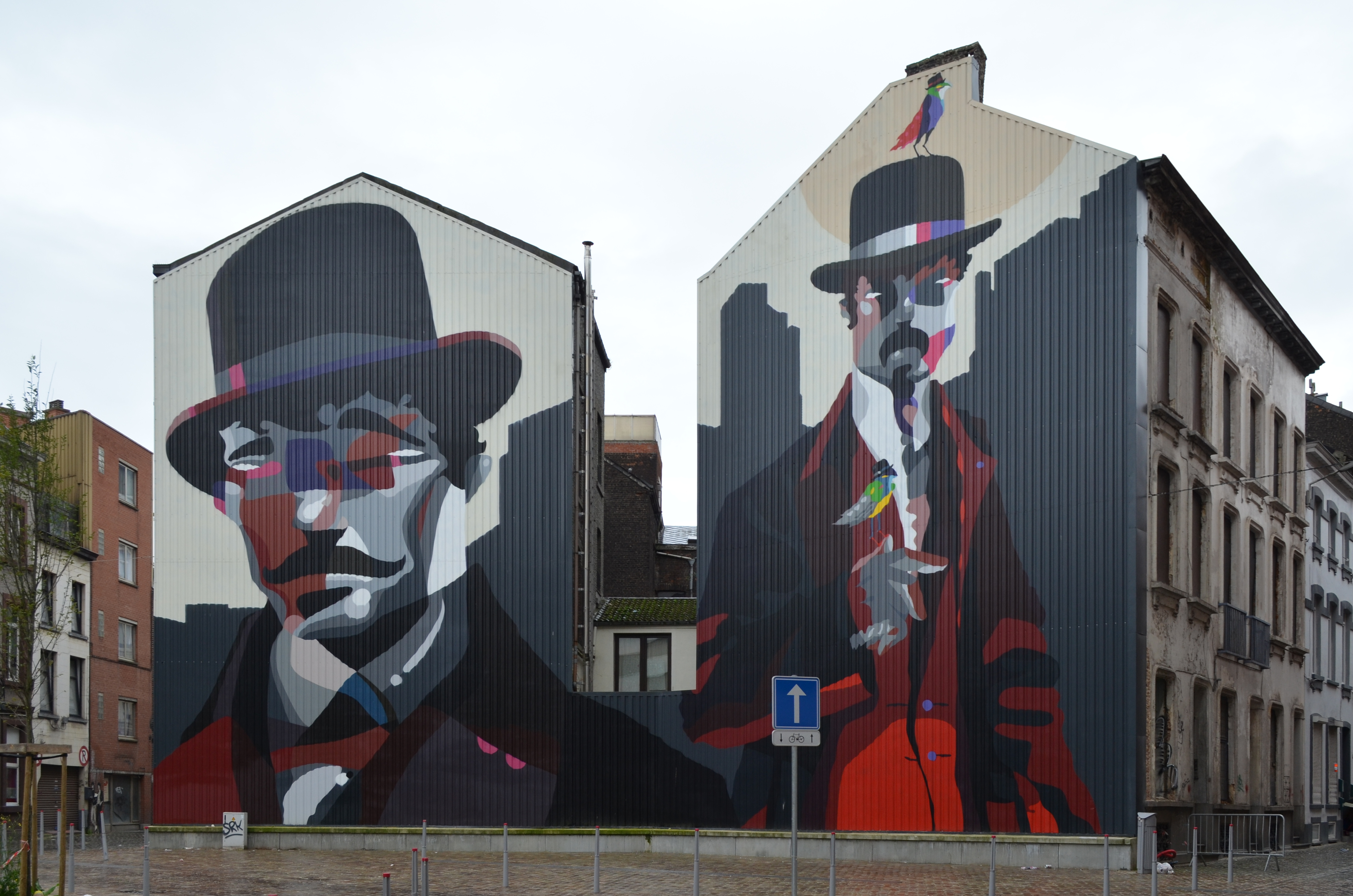 Sozyone Gonzales - art urbain dans le cadre de Asphalte#1 à Charleroi.